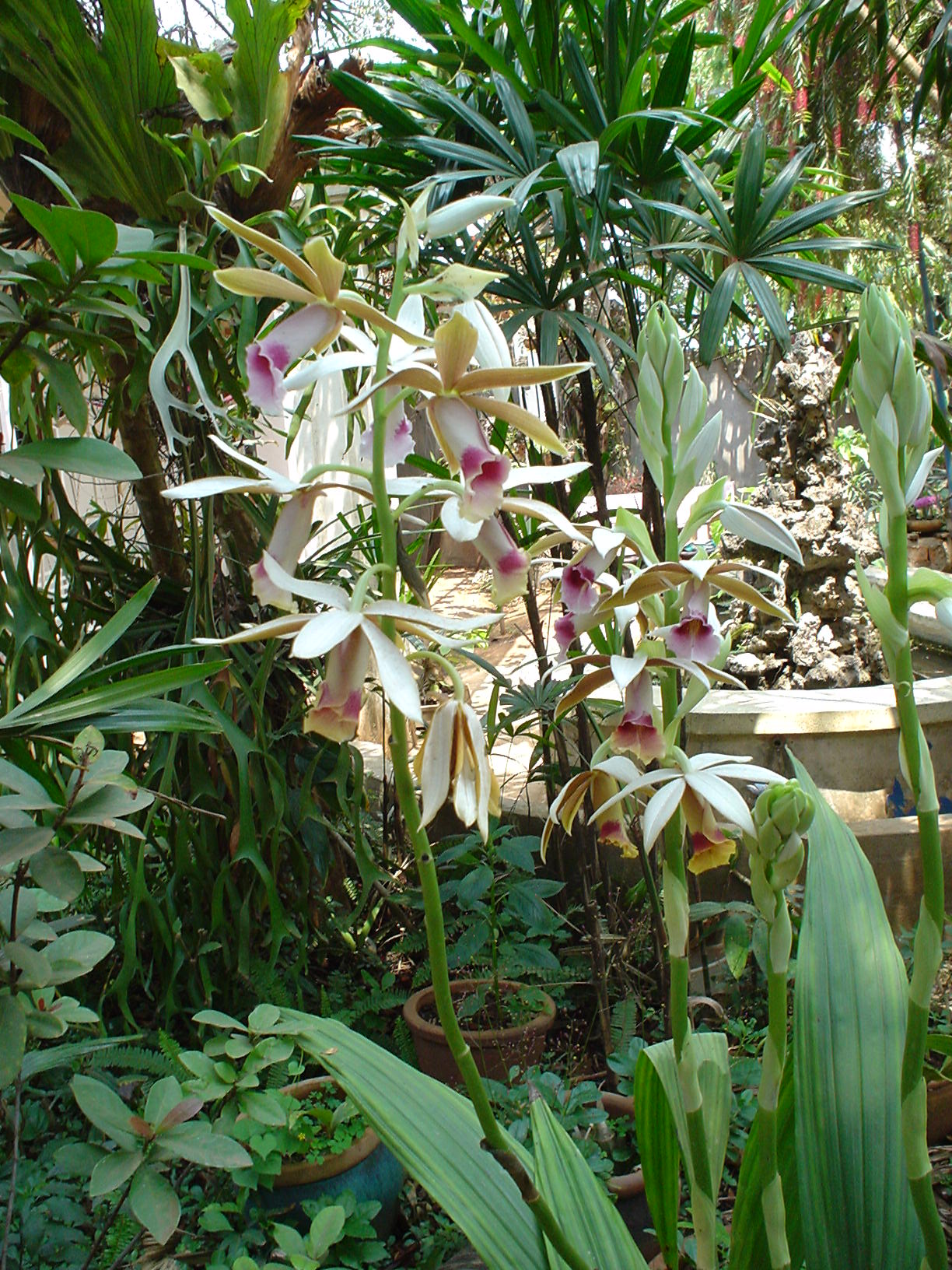 Hạc đỉnh nâu (Phaius tankervilleae)